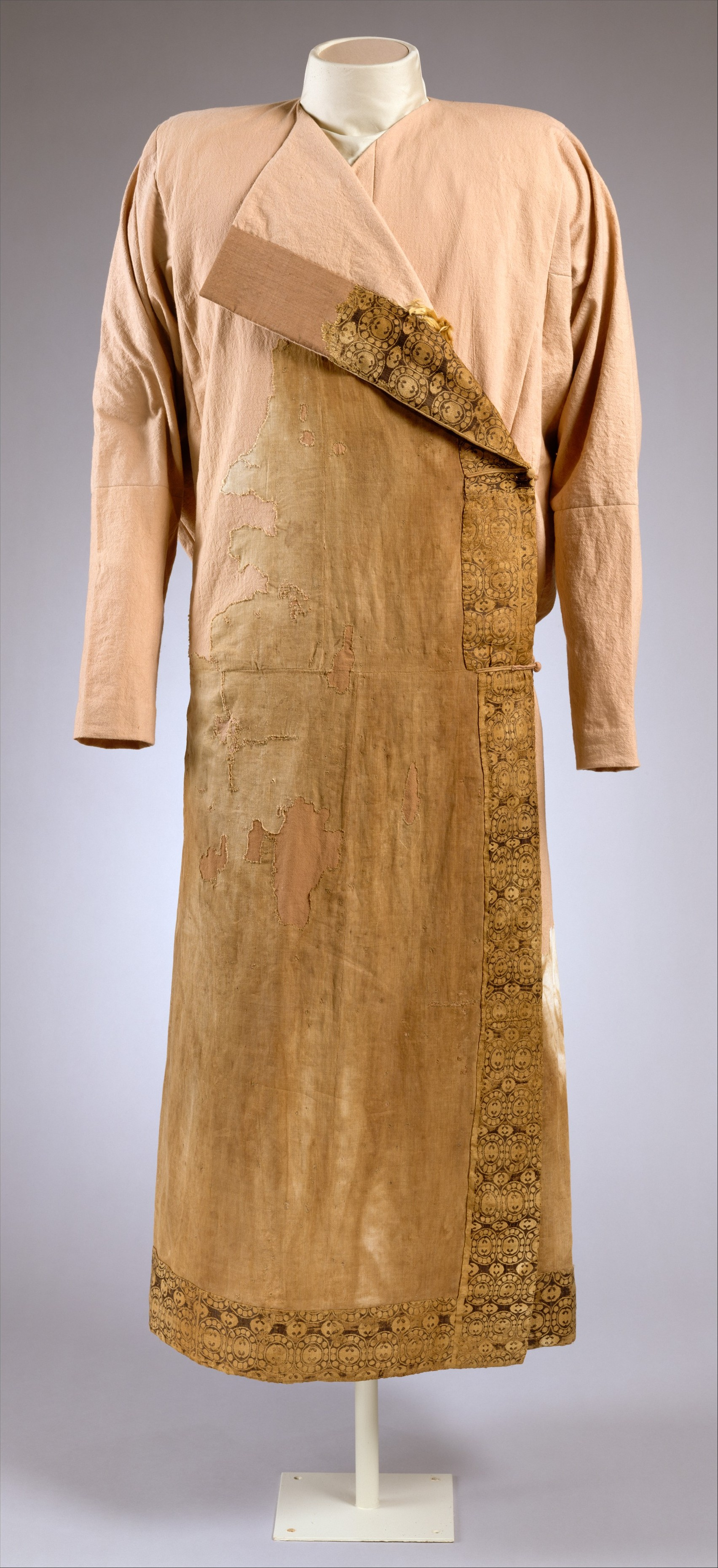 Textile; Textiles-Costumes